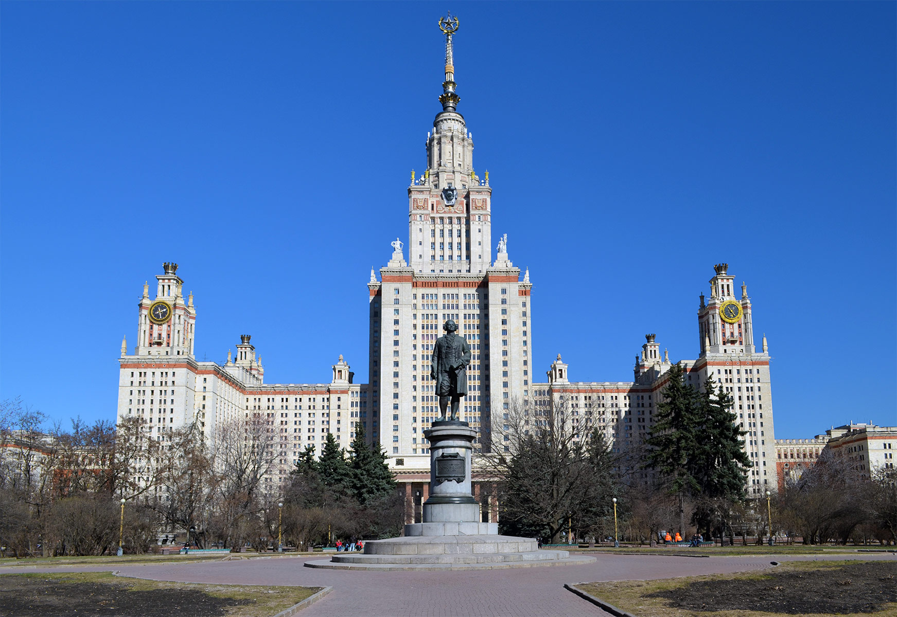 Памятник Ломоносову на фоне Главного здания МГУ